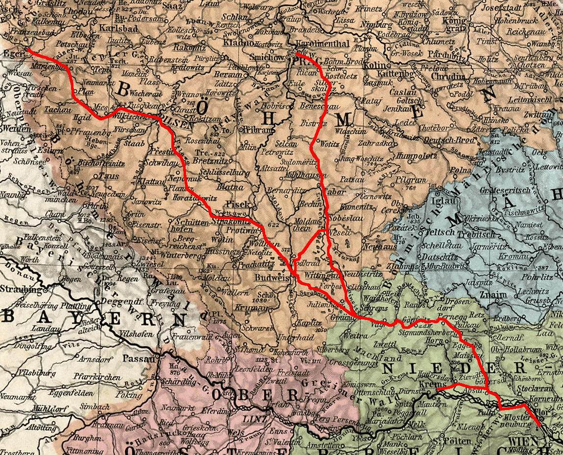 Síť společnosti Dráha císaře Františka Josefa